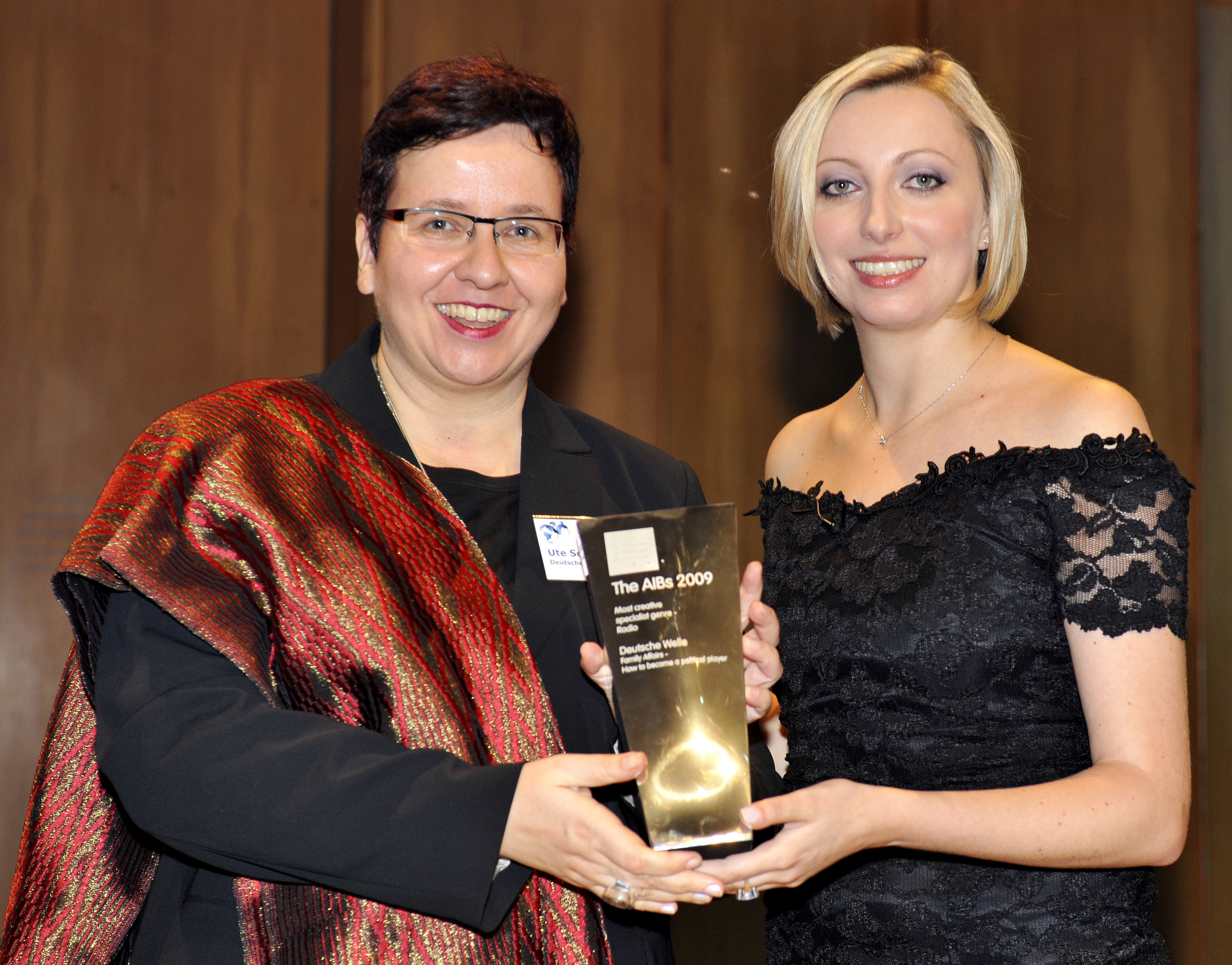 Ute Schaeffer